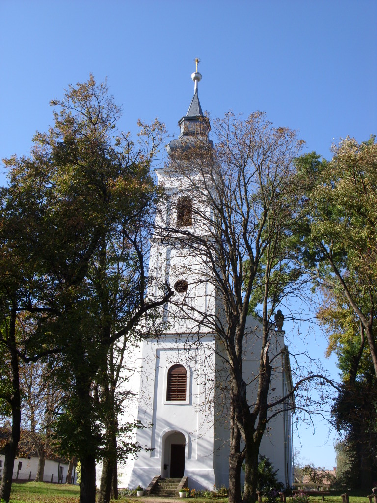 A látrányi copf stílusú református templom